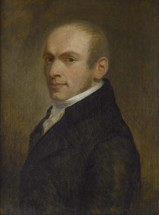 Andrea Appiani (1754- 1817 ) Ritratto del musicista Bonifacio Asioli (1805). Olio su tela 54,5 x 42 cm GAM 1083. Deposito Pinacoteca di Brera, Milano (1902). L'opera è descritta in